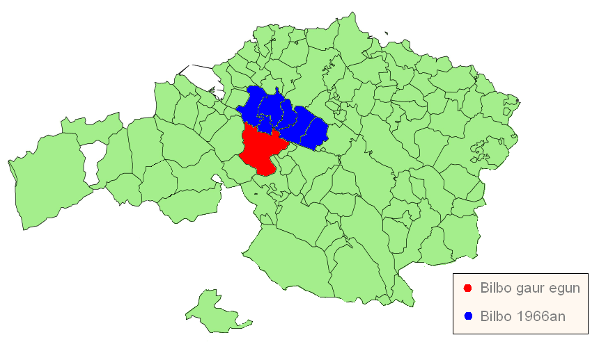 Bilbo historikoa.